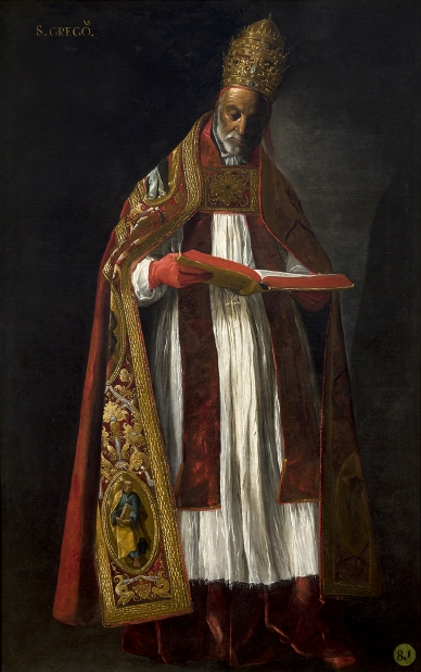 Este lienzo forma parte de la serie de los cuatro Padres de la Iglesia realizados por Zurbarán para el convento de San Pablo de Sevilla. Nos encontramos ante una obra clavedentro del periodo inicial del pintor, en el que están ya presentes algunos de los elementos significativos de su pintura.. Así, su gusto por la minuciosa reproducción de los objetos, que alcanza su máximo explendor en sus bodegones, y que en este lienzo podemos observar en dos detalles como son el libro que sostiene con ambas manos, y la mitra con la triple corona del santo papa. Este detallismo sobresale especialmente en su capacidad para recrear la calidad de los ejidos, que en su pintura adquieren gran protagonismo. En esta obra podmos inturi la ligereza del alba blanca rematada de encaje, la suave textura del terciopelo de la sotana, la estola o la capa, y la maestría del artesano con el oro y las sedas en la rica cenefa bordada. La obra trasmite espiritualidad y trascendencia, ésta reforzada por el intencionado ensimismamiento de la figura, que se nos presenta concentrada en la lectura del libro y con un expresivo rosto de rasgos naturalistas. La acertada conjunción de luces y sombras, unida a la magistral recreación de las texturas y la intensa vida interior que trasmite el personaje, dan como resultado una obra de solemne monumentalidad..